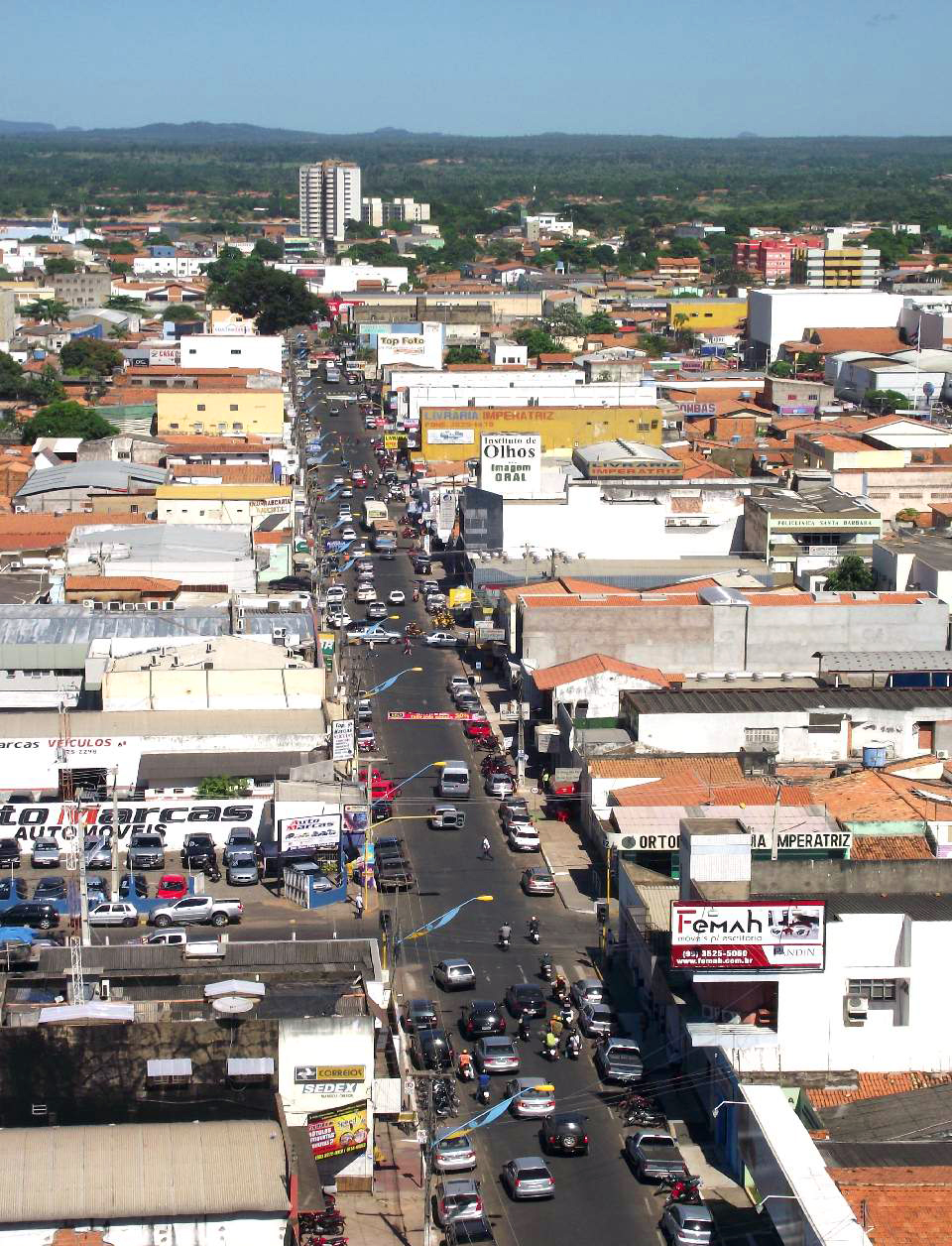 Avenida Dorgival Pinheiro de Sousa. Imperatriz Maranhão.